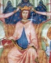 Jaume II de Mallorca jura els privilegis del regne de Mallorca el 1276. Miniatura pintada per Romeu Despoal (representat a baix) vers 1334 al Llibre de privilegis dels reis de Mallorca (Arxiu Històric Municipal de Palma)